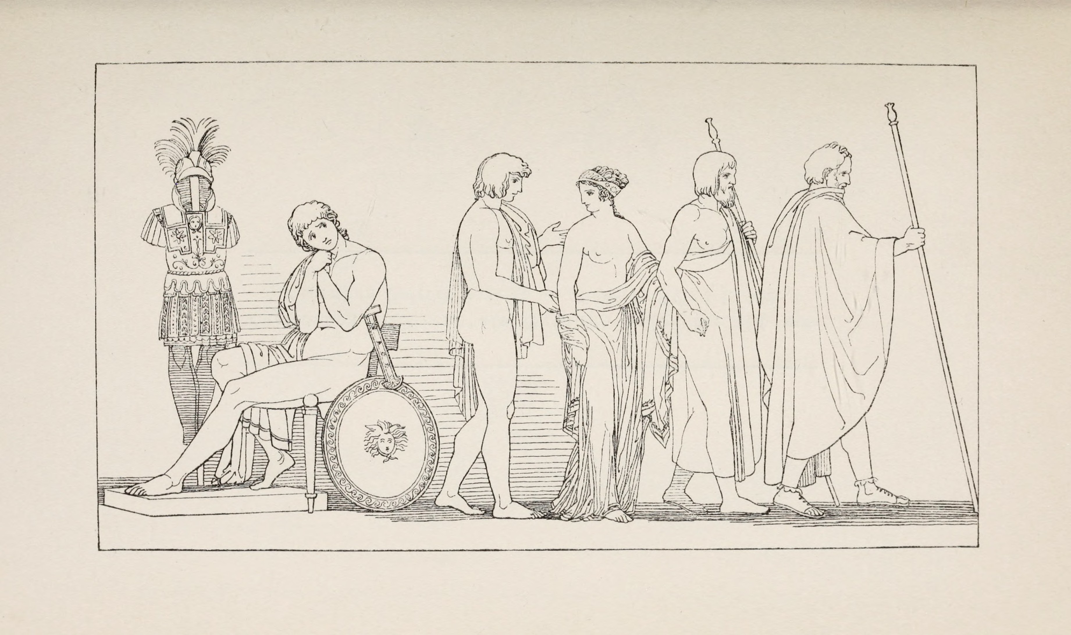 Briseis, von Patroklos den Herolden übergeben (links Achill, dann Patroklos, Briseis und die Herolde). – Homer, Ilias I. 346. Schwab, Sagen des klassischen Altertums I. 392.